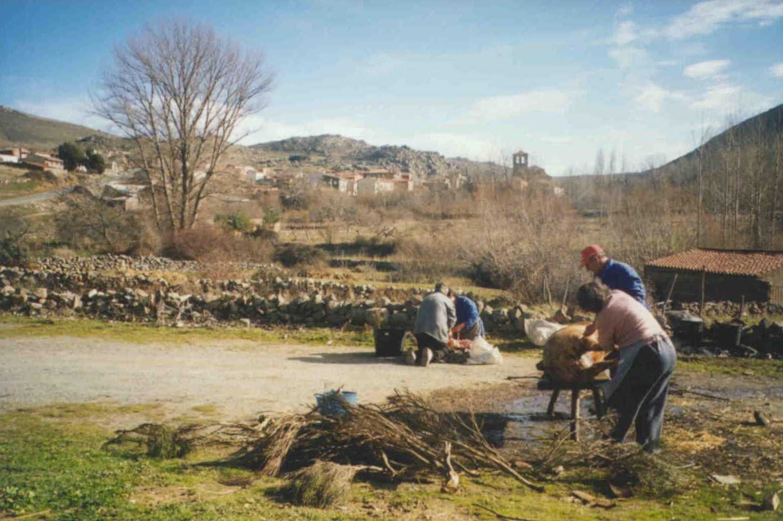 La tradicional matanza del cerdo en Riofrío (Ávila, España).